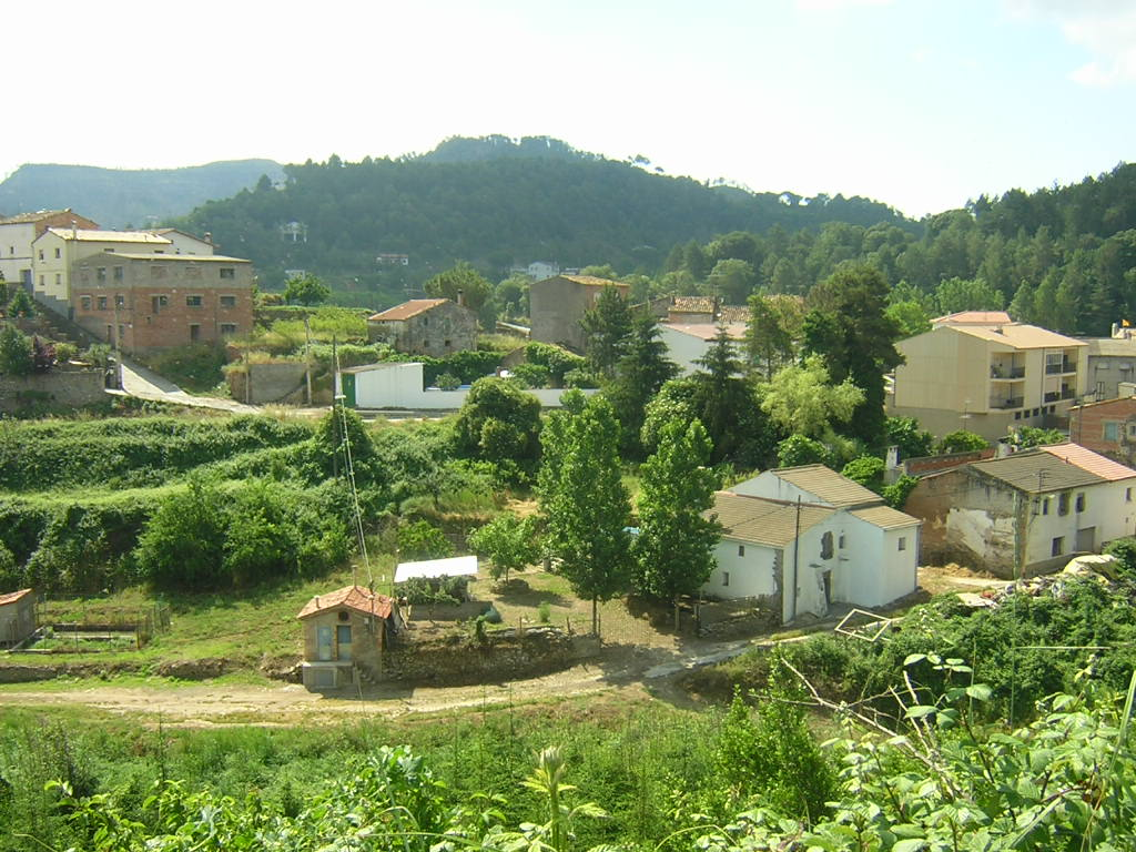 La Font del Poble (Monistrol de Calders, Moianès)